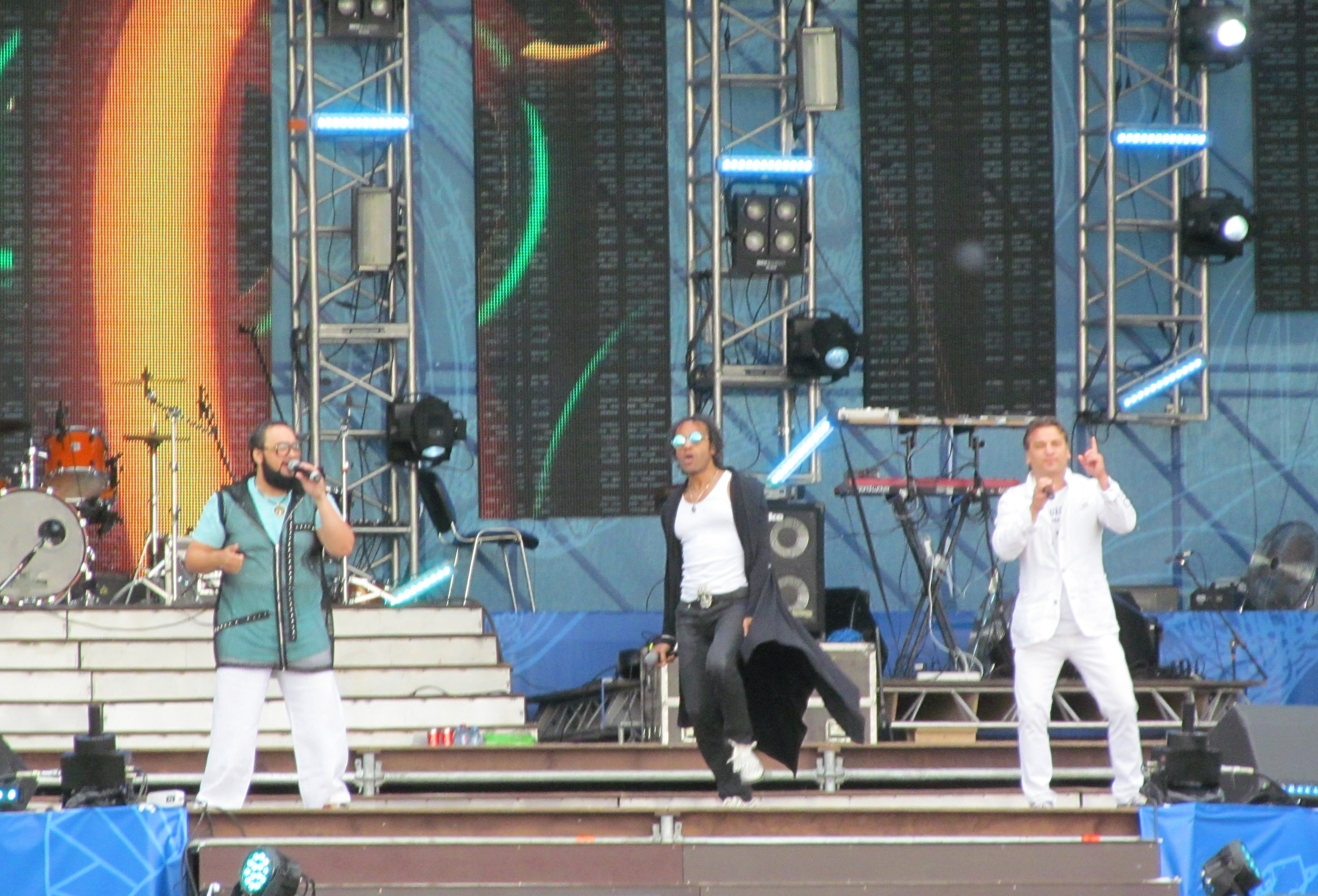 Группа «ПМ» (Жан Григорьев-Милимеров, Питер Джейсон, Марат Чанышев) в Перми.